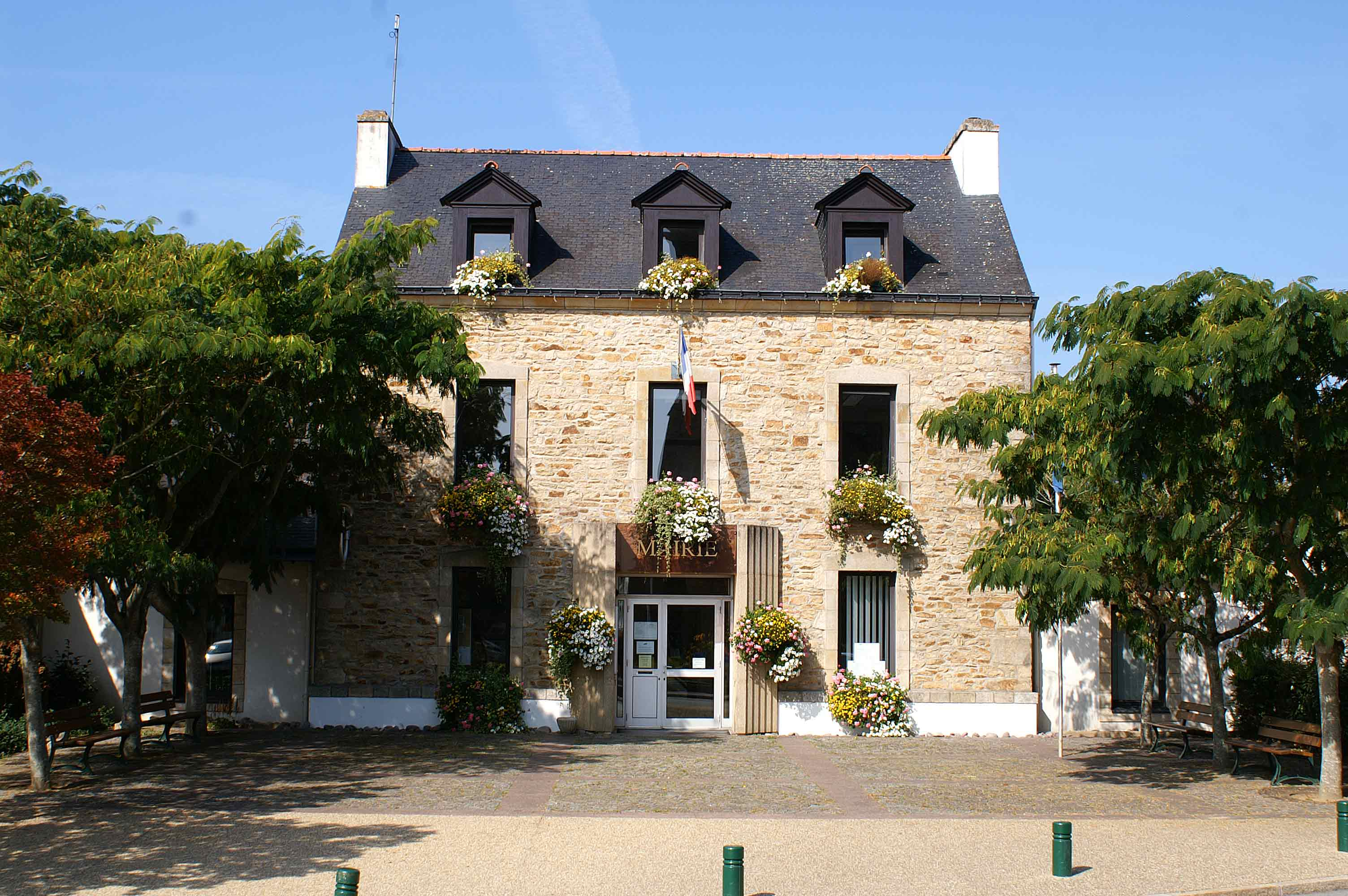 Au centre du bourg, le bâtiment principal de la mairie d'Arradon.